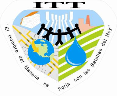 Logo del año 2005 del ITT